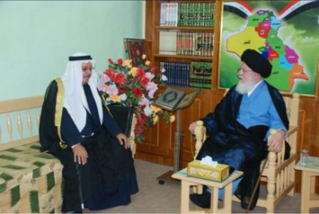 الشيخ سعد الرماحي مع السيد حسين الصدر